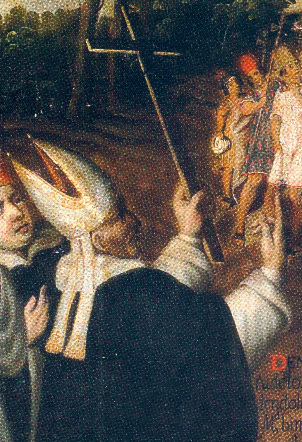 Detalle de La Victoria de Cajamarca (Copia de un cuadro del Convento de Santo Domingo, Cuzco)